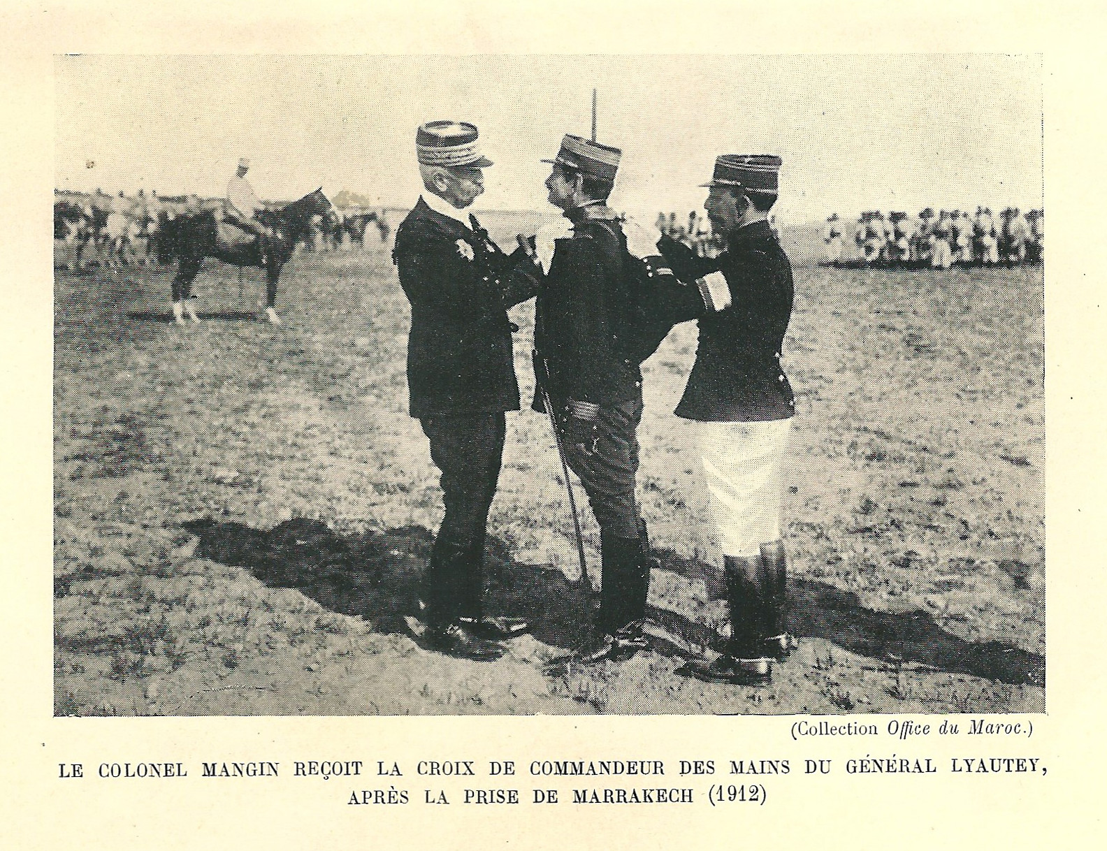 Charles Mangin (1866-1925) décoré par Lyautey